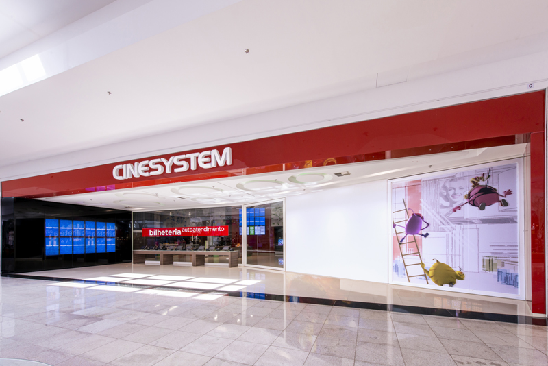 A exibidora que mais cresceu nos últimos cinco anos está em plena expansão no País.